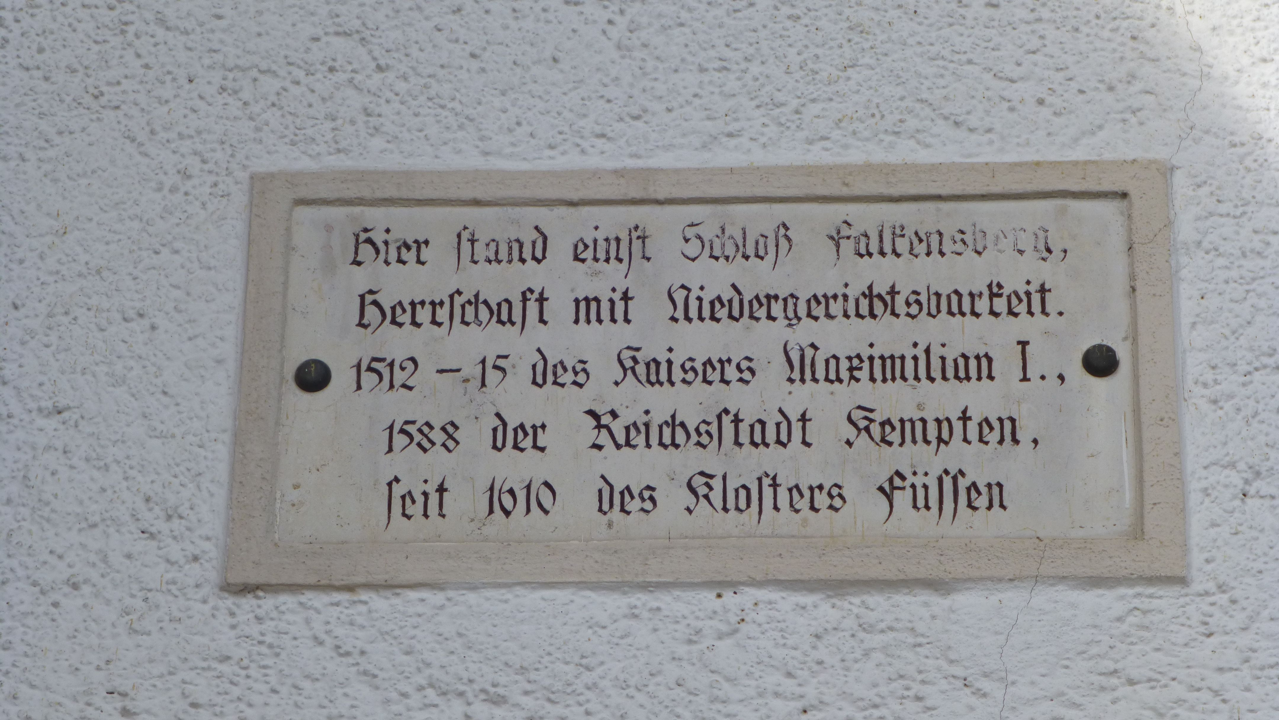 Gedenktafel an die Burg Falkensberg über der Haustüre des Schlossbauers